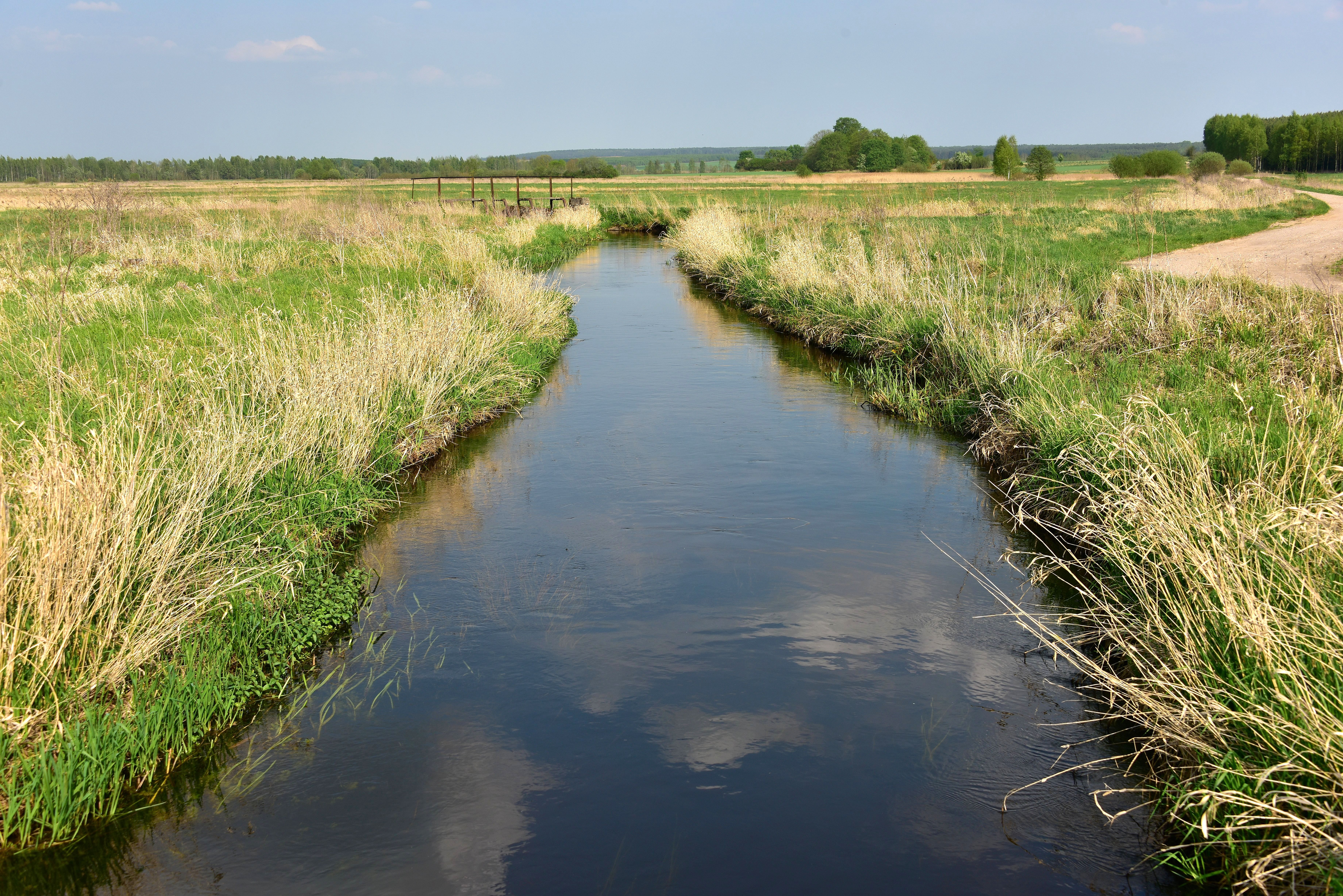 Rzeka Nietupa w pobliżu wsi Łapicze, województwo podlaskie